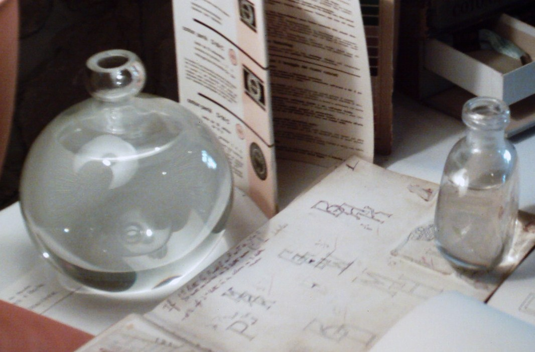 Carafes qui servaient à concentrer la lumière pour éclairer la broderie.